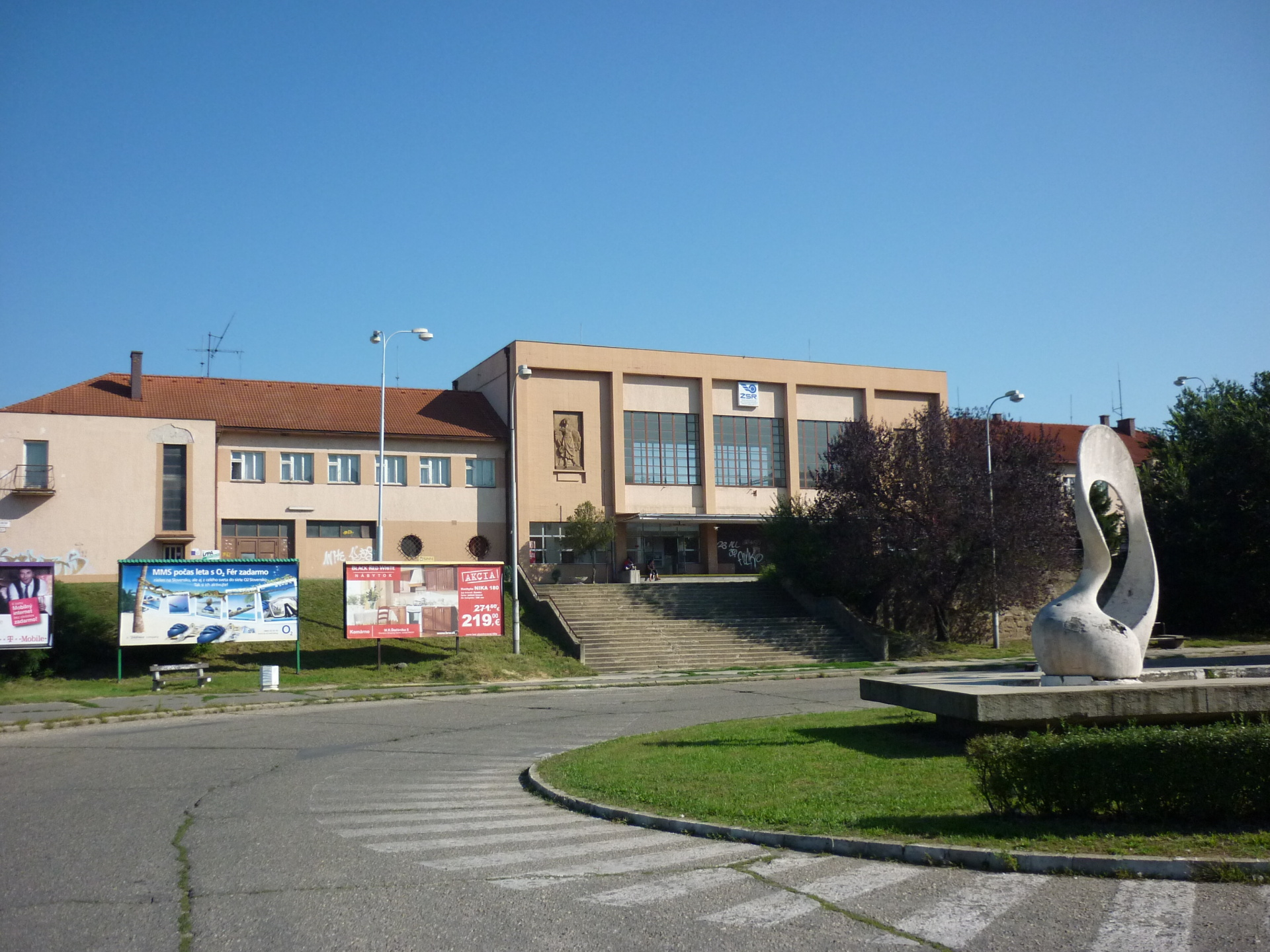 Komárno - železniční stanice